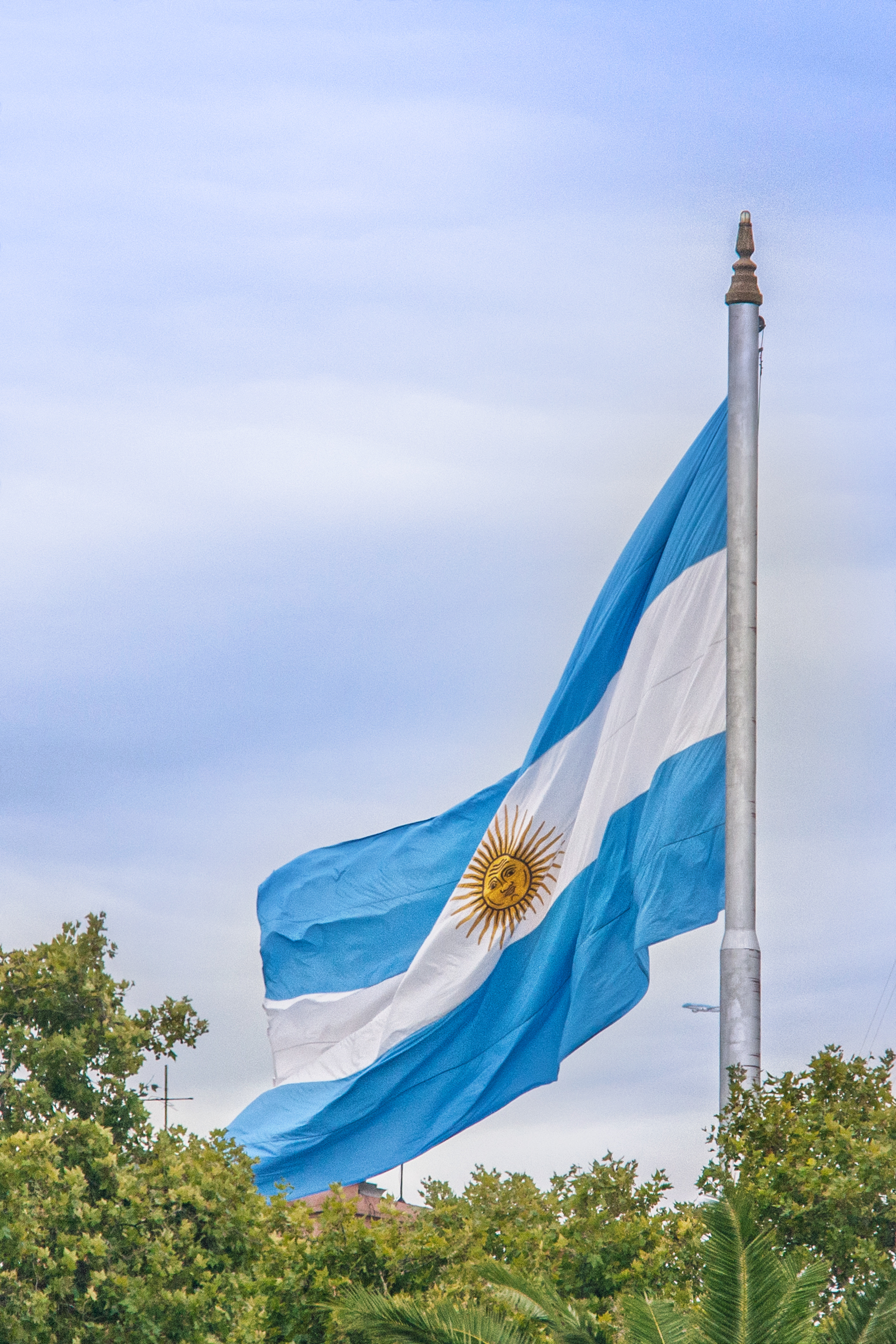 Buenos Aires, Argentina